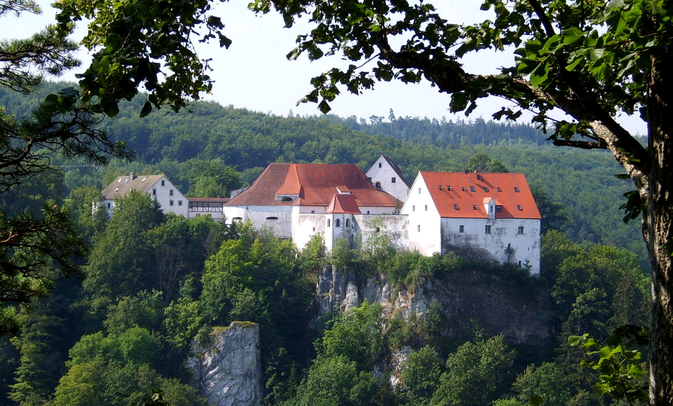 Burg Wildenstein vom Bandfelsen aus gesehen. Auch hier zu erkennen, wie der Burgfelsen bündig mit den Gebäuden abgebrochen und begradigt wurde, um die Burg sturmfrei zu halten.